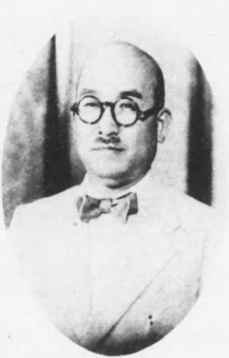 薄田美朝（1897-1963）